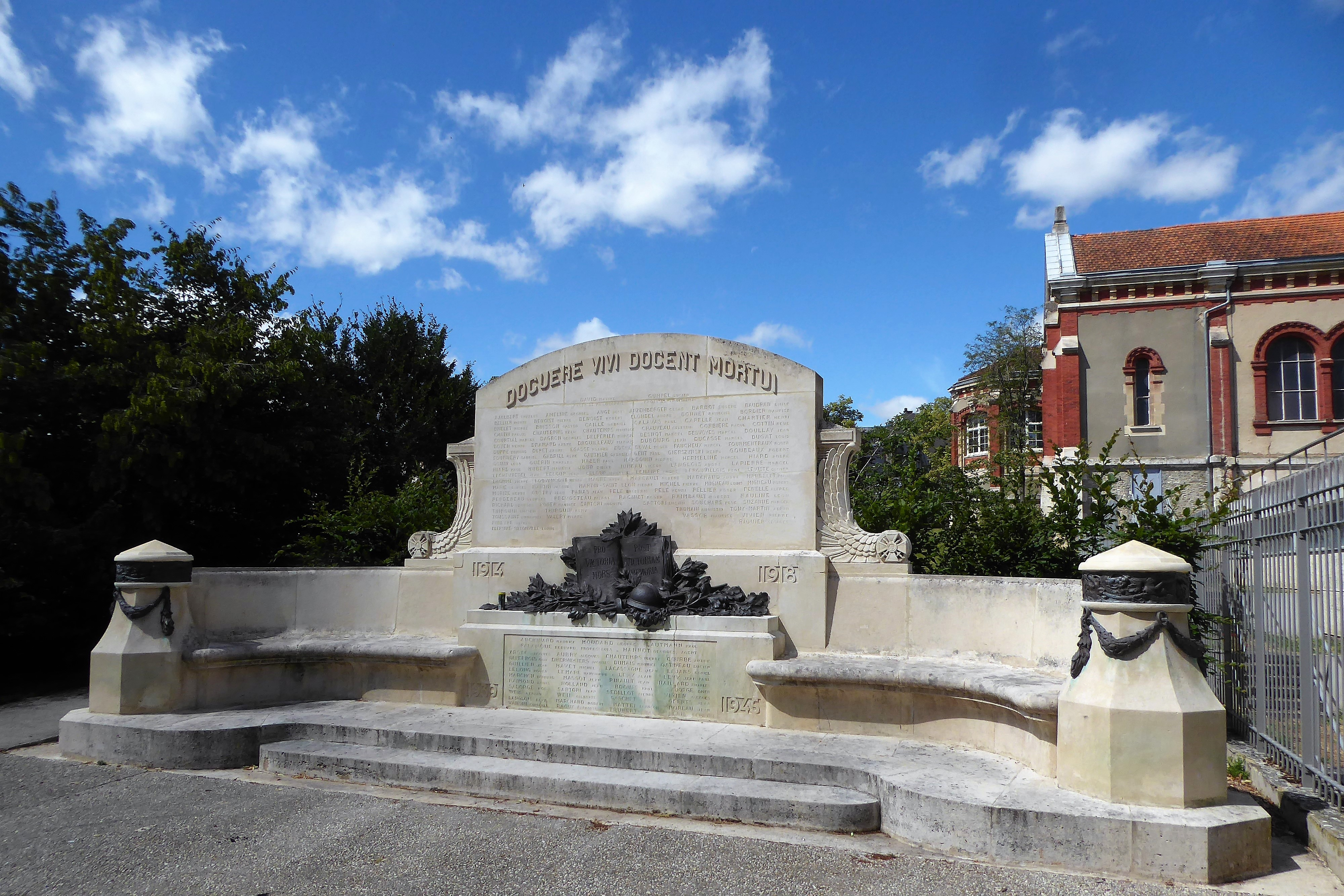 Monument aux morts du lycée Marceau, square Noël Ballay, Chartres, Eure-et-Loir, France, suite au déplacement en octobre 2017 de l'ancienne cour d'honneur du lycée au square Noël Ballay. « Docuere vivi docent mortui » « Pro victoria mors post victoriam memoria »